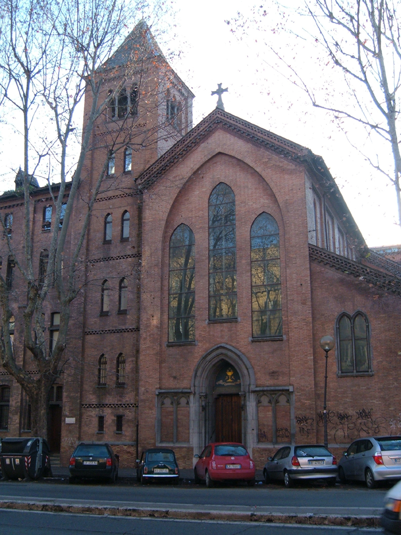 Chiesa del Corpus Domini, a Roma, nel quartiere Nomentano.